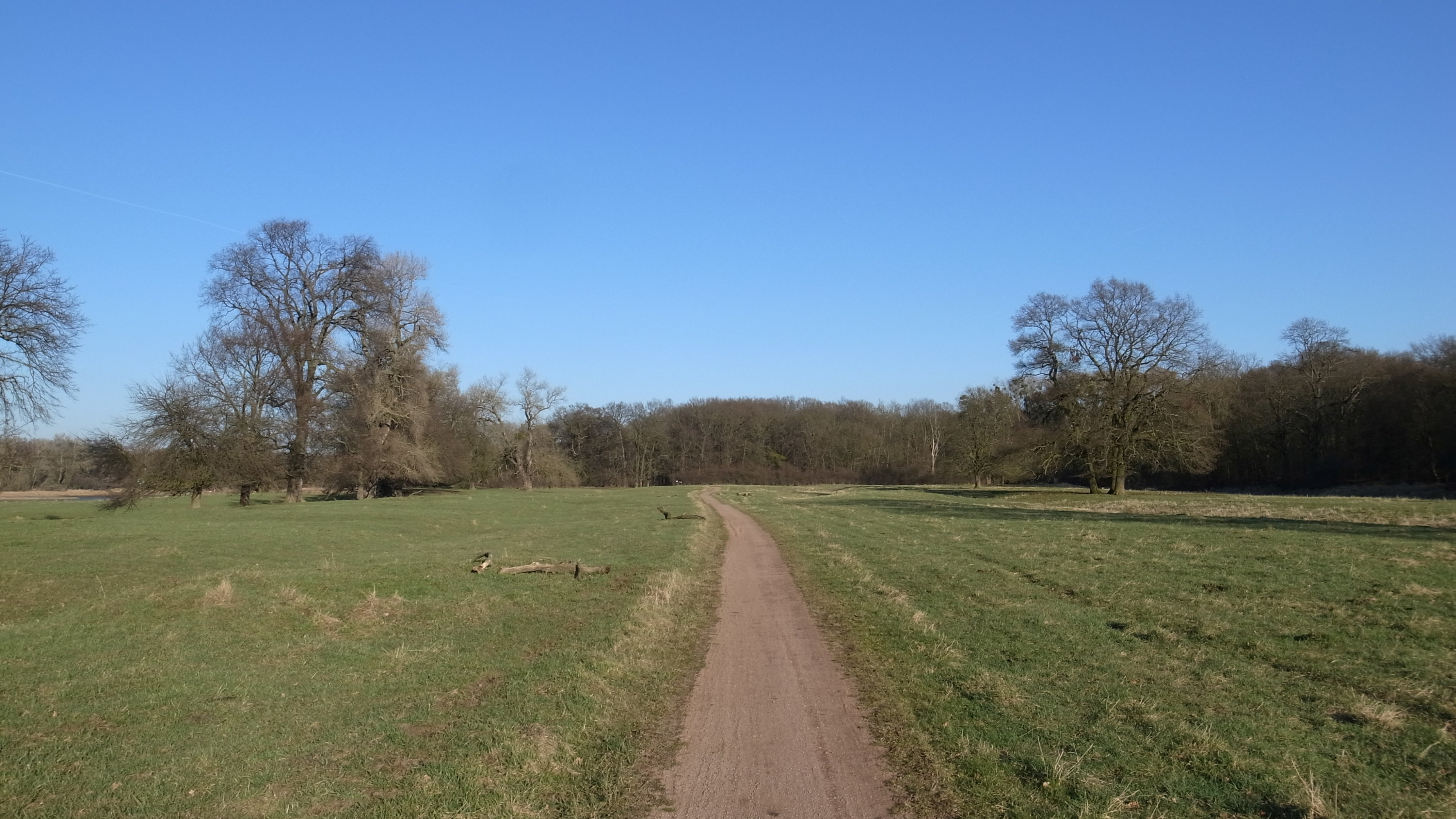 Dessau-Roßlau, Ortsteil Großkühnau, Rad- und Wanderweg an der Elbe duch das Naturschutzgebiet Saalberghau.